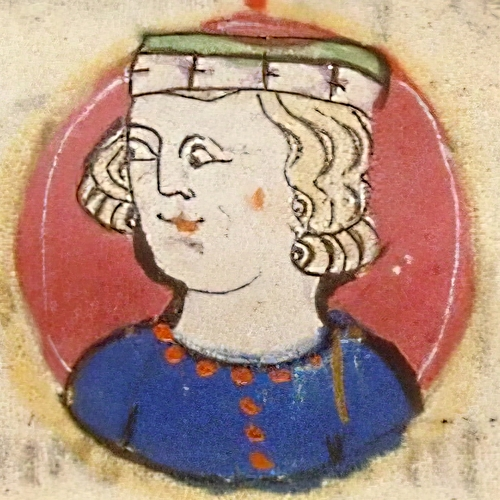 Henry I of Champagne